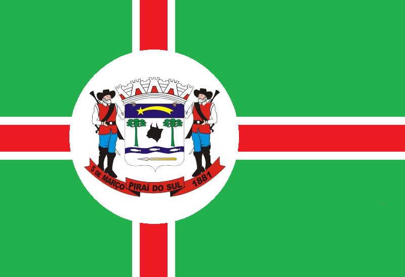 Bandeira do município de Piraí do Sul, Estado do Paraná, Brazil